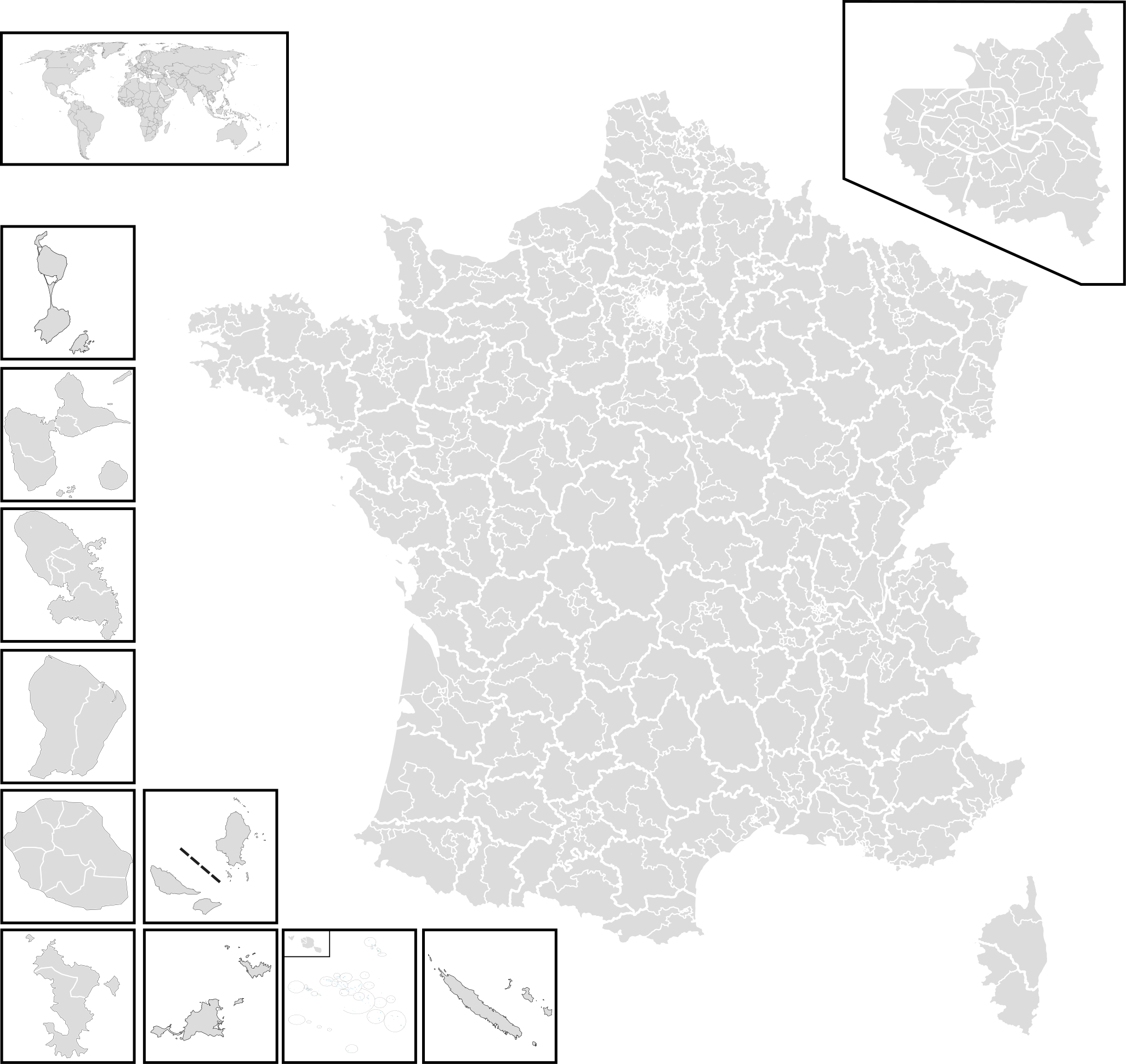 Circonscriptions législatives françaises depuis le redécoupage électoral de 2010